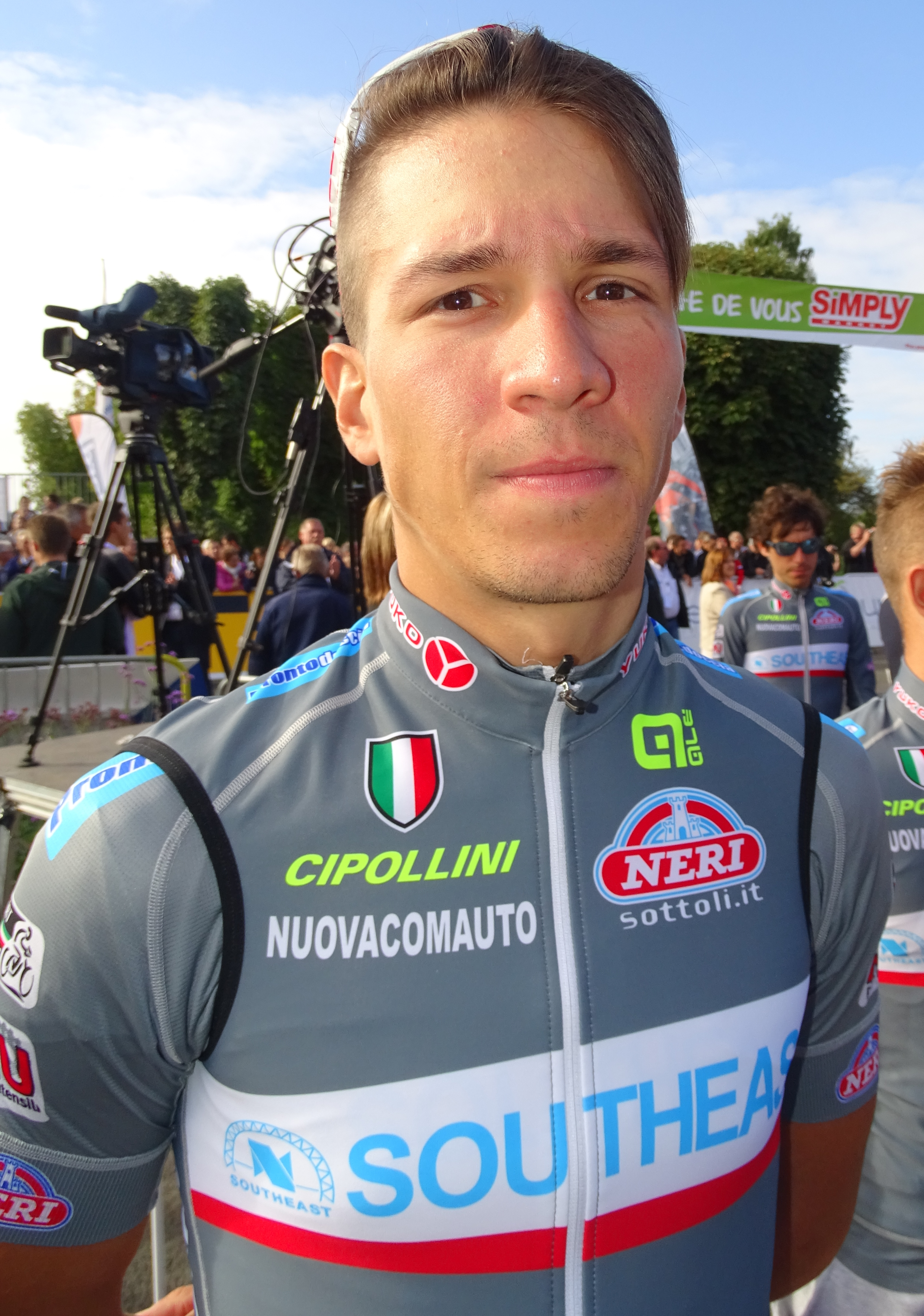 Reportage réalisé le dimanche 6 septembre à l'occasion du départ et de l'arrivée du Grand Prix de Fourmies 2015 à Fourmies, Nord-Pas-de-Calais, France.